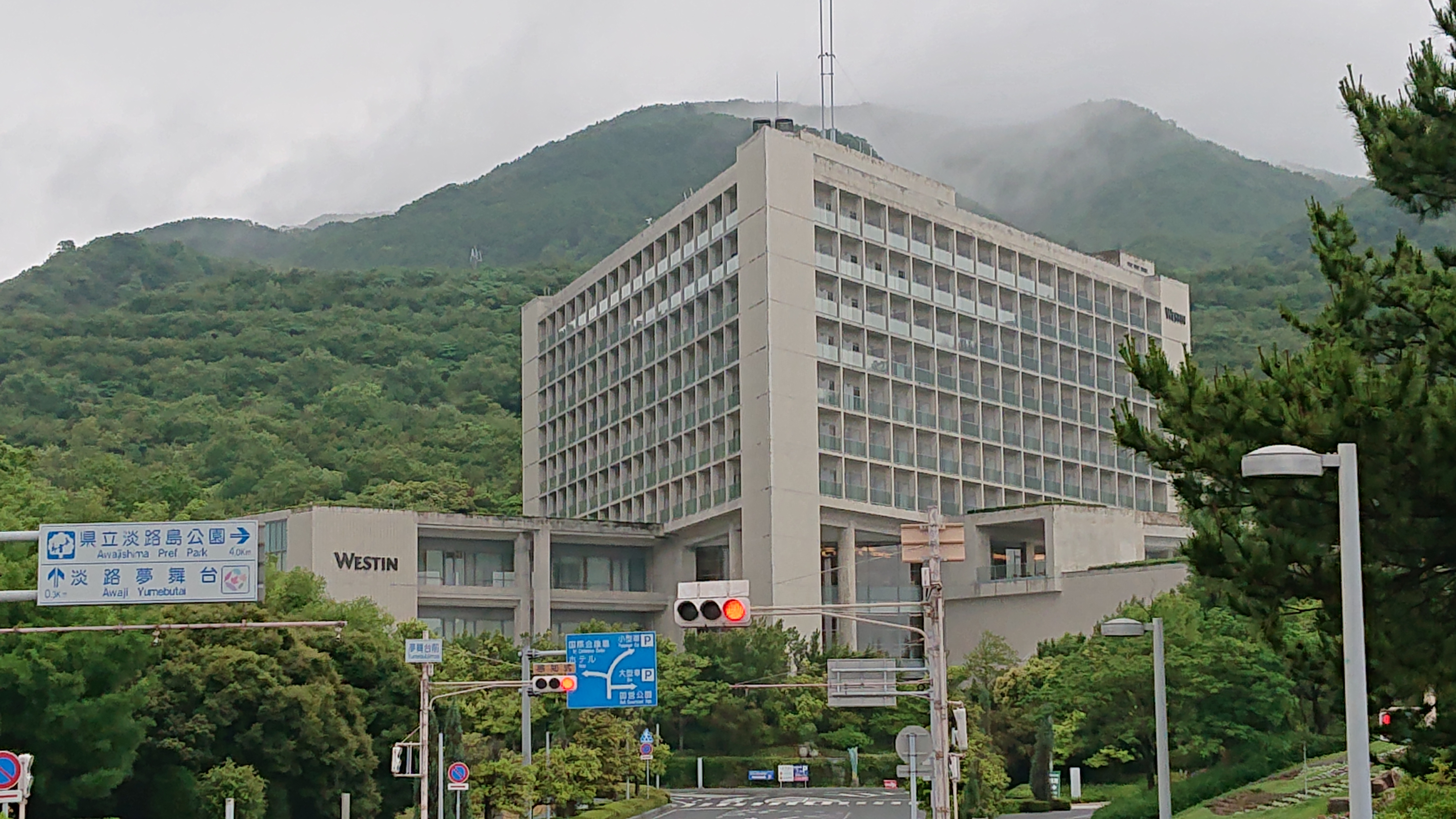 ウェスティンホテル淡路の外観